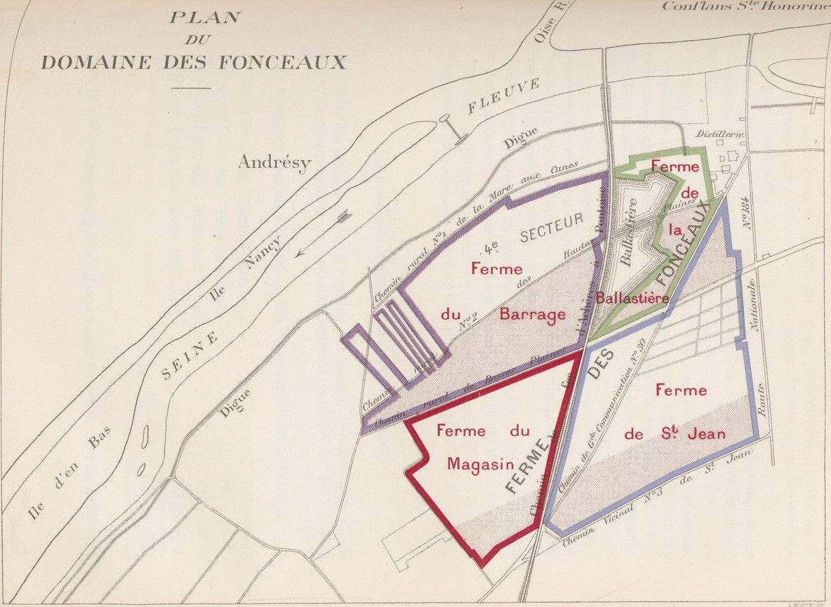 Plan du domaine des Fonceaux au sein du Parc Agricole d'Achères (1913)